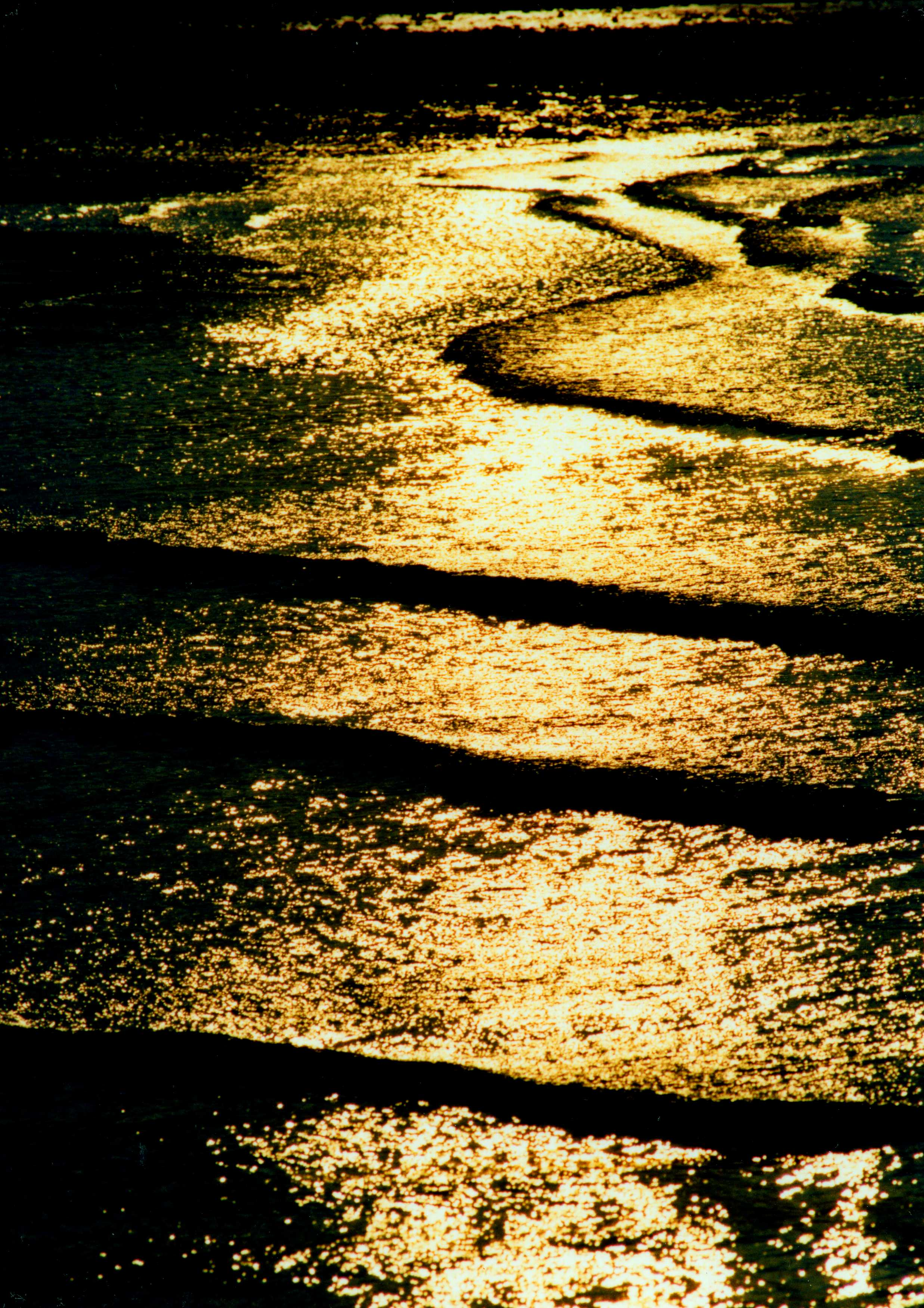 蕪崎（愛媛県中央市）